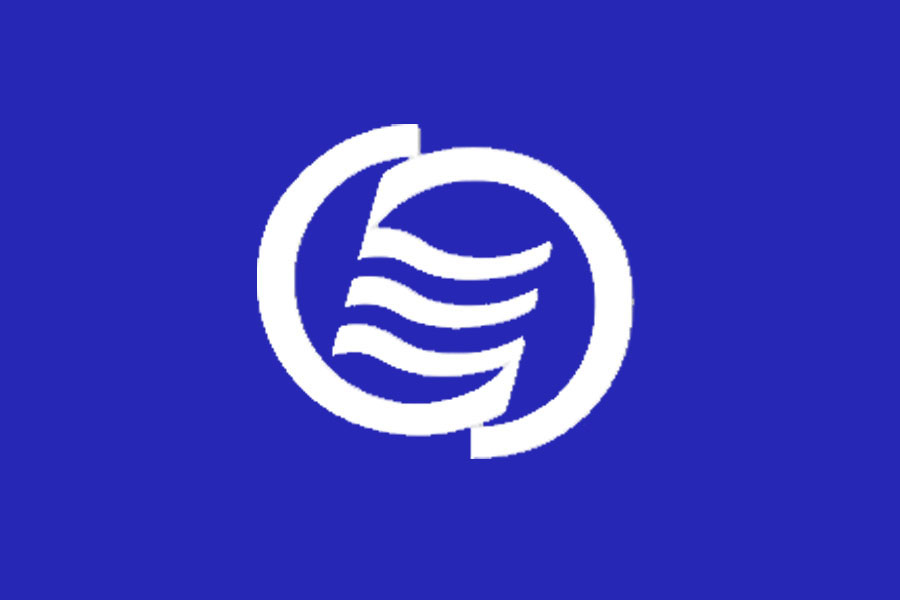 Bandera de la AEC